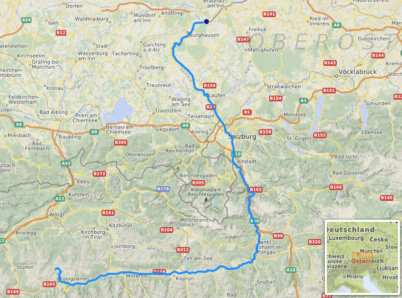 carte réalisée sur umap [1]